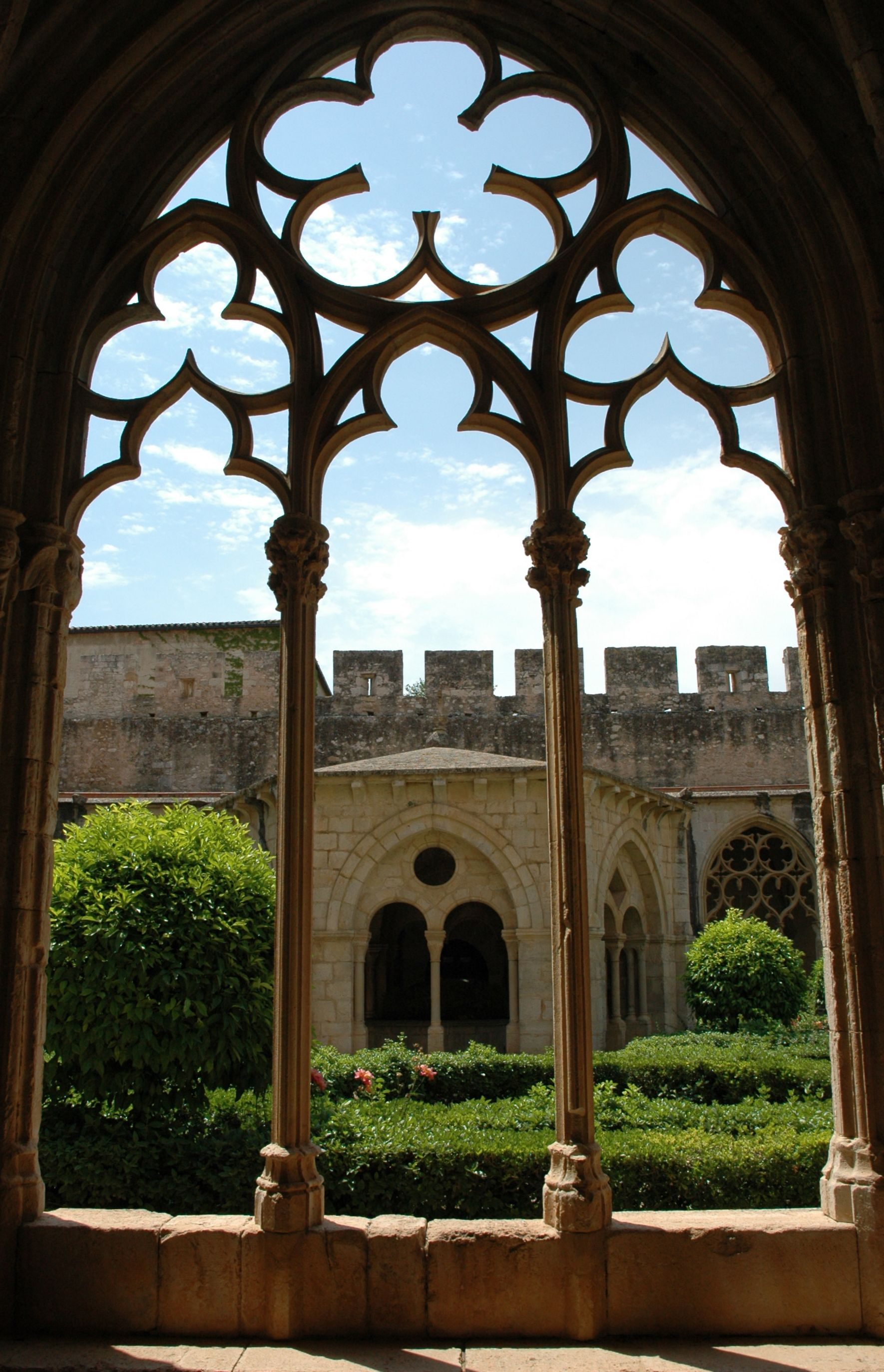 Monestir de Santes Creus - Claustre, al fons el lavatori